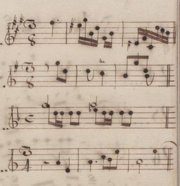 Table du volume X des manuscrits de Venise (incipit des sonates 31 à 34, K. 448 à 451).